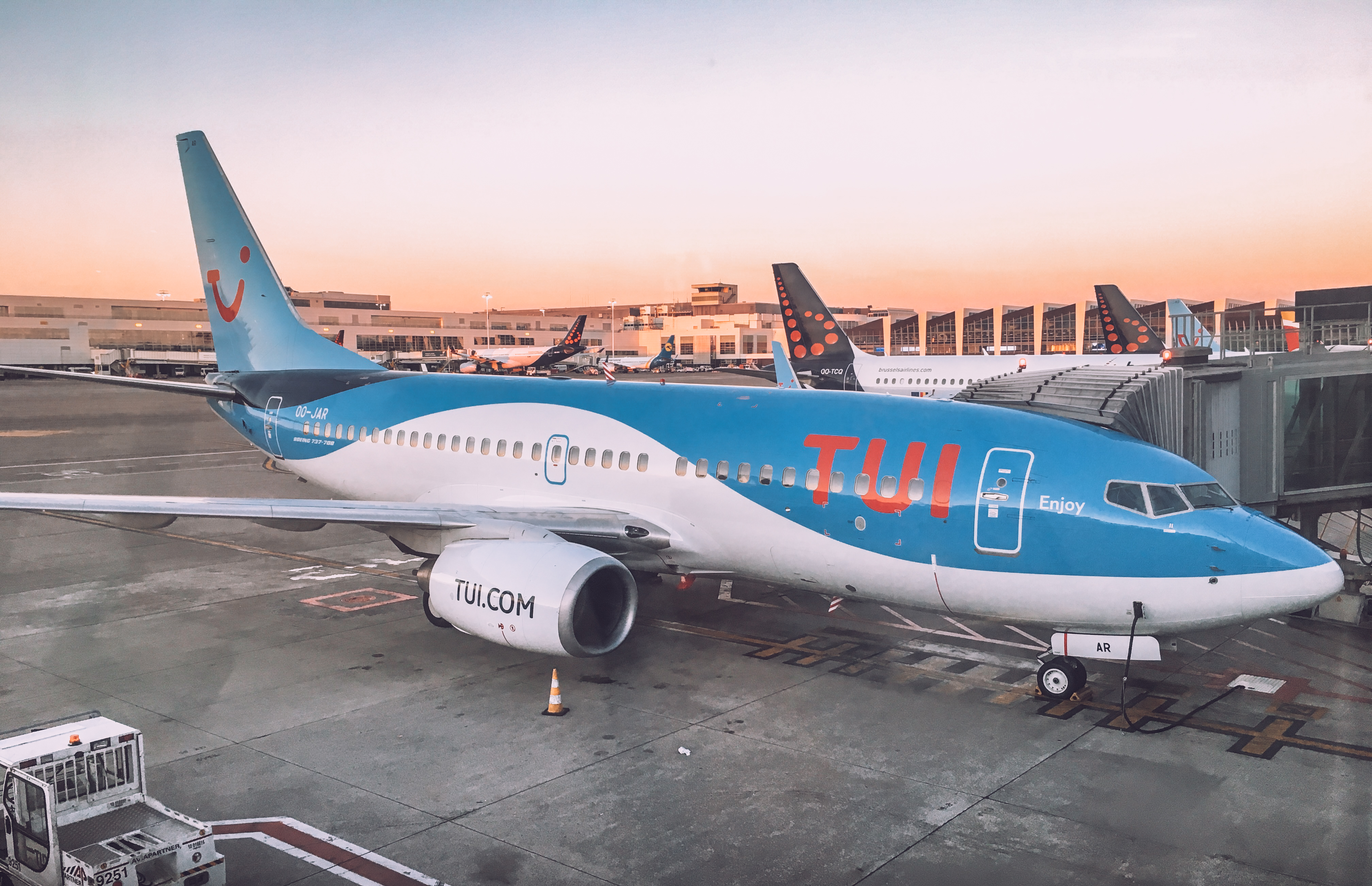 Boeing 737-700WL OO-JAR 'Enjoy' of TUI fly Belgium.